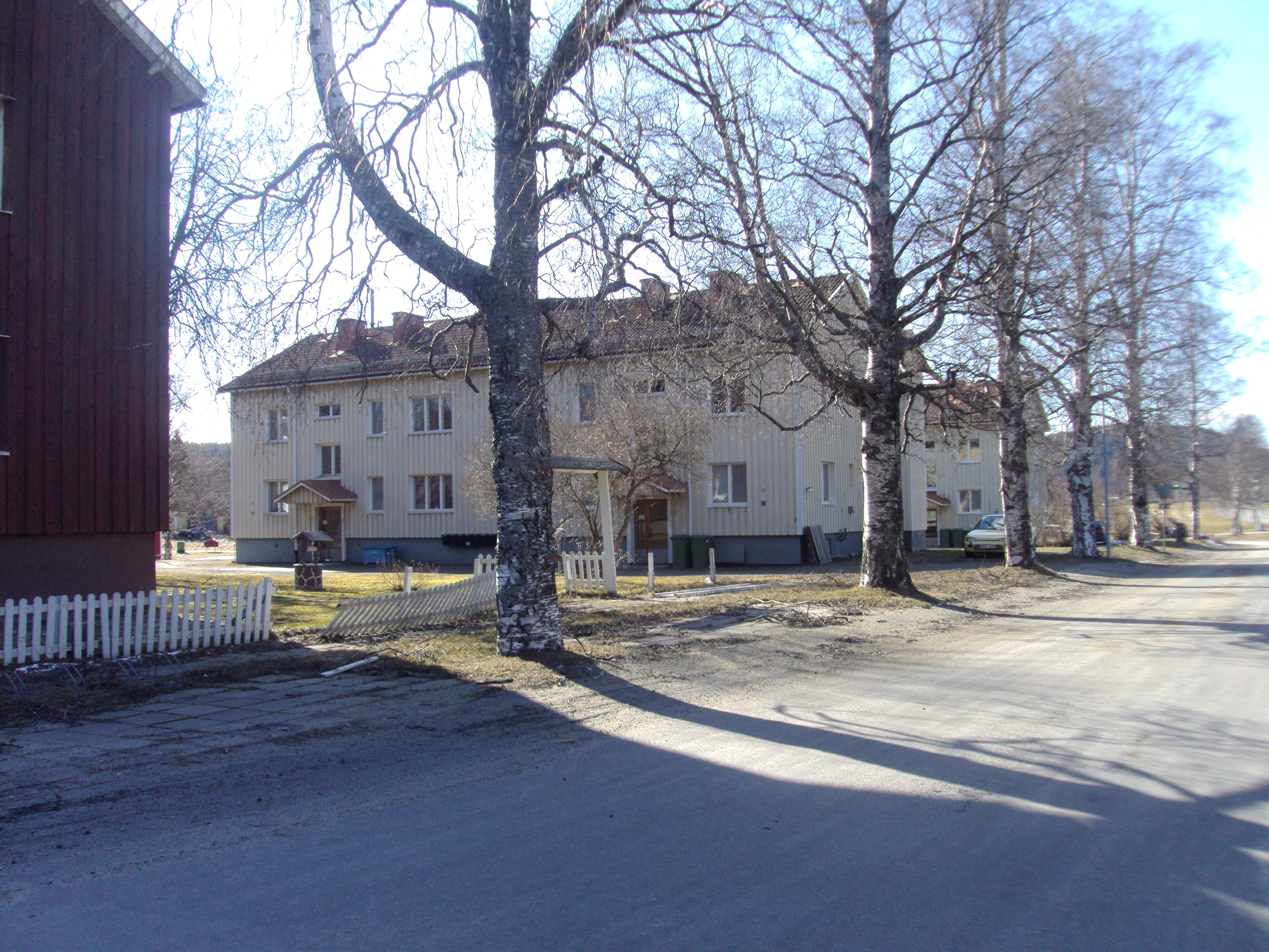 Byggnader i Utansjö, Sverige.